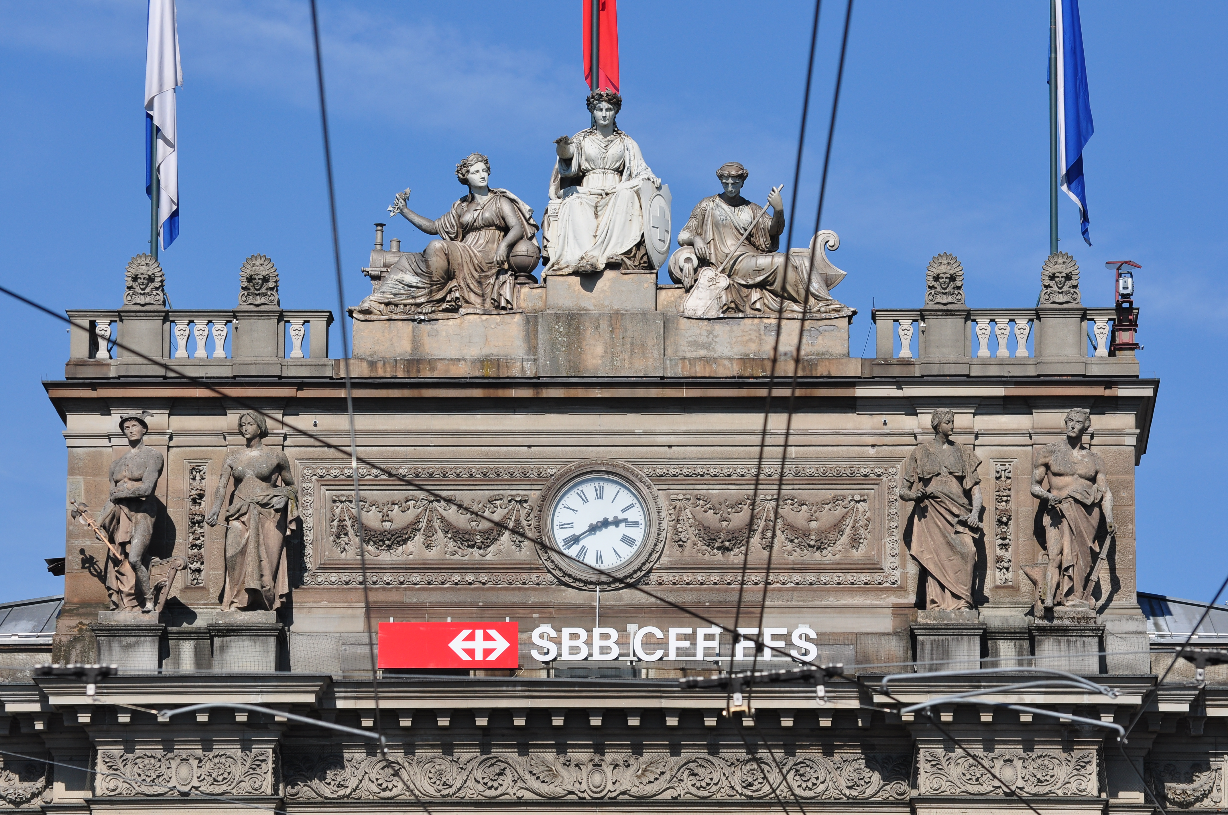 Hauptbahnhof in Zürich (Switzerland) as seen from Bahnhofstrasse